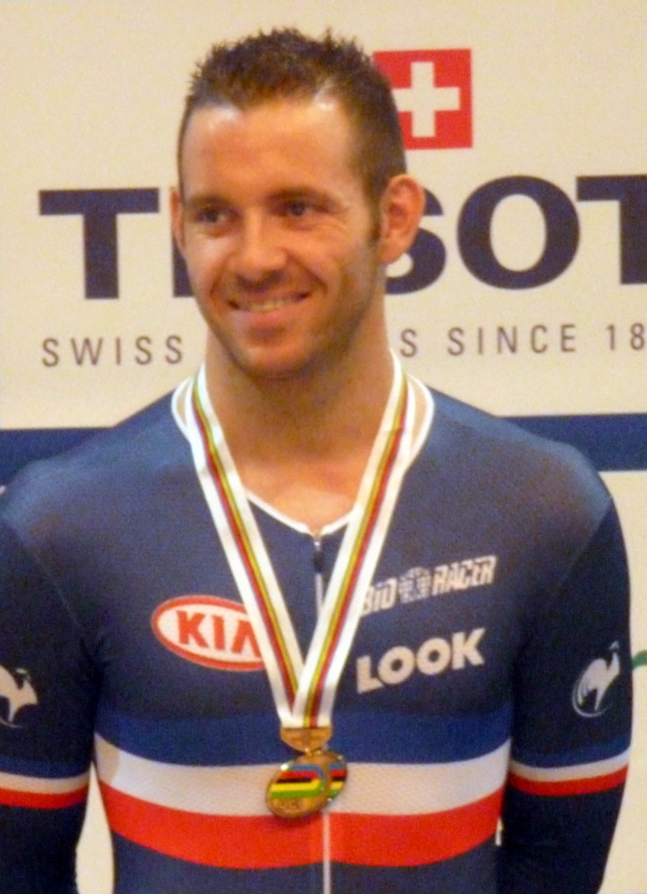 François Pervis, französischer Radrennfahrer